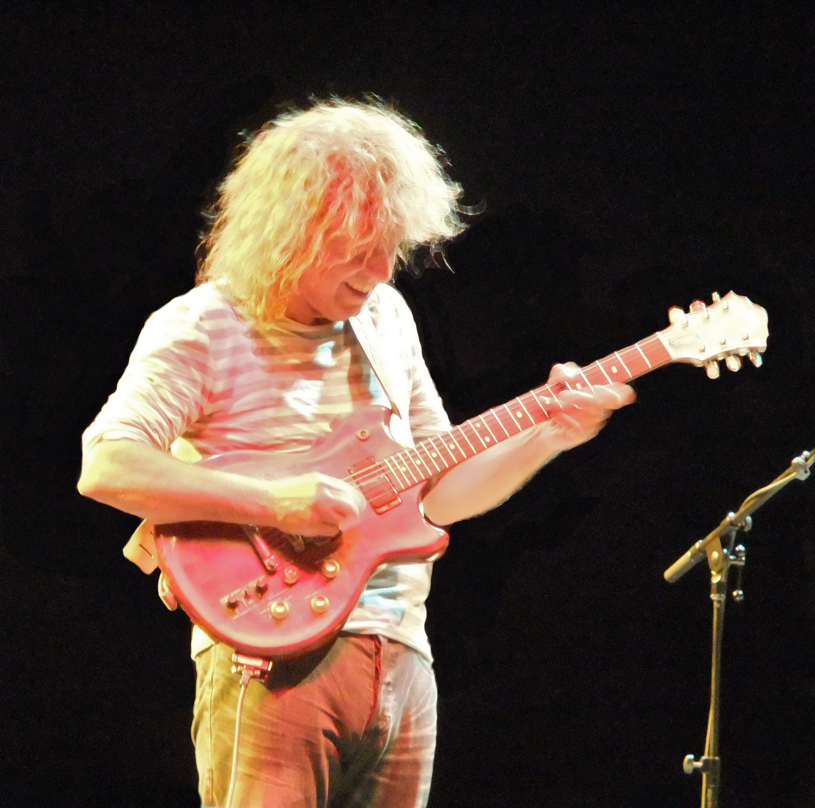 Pat Metheny si esibisce in piazza San Marco a Venezia nell'ambito del Venice Jazz festival il 23/07/10